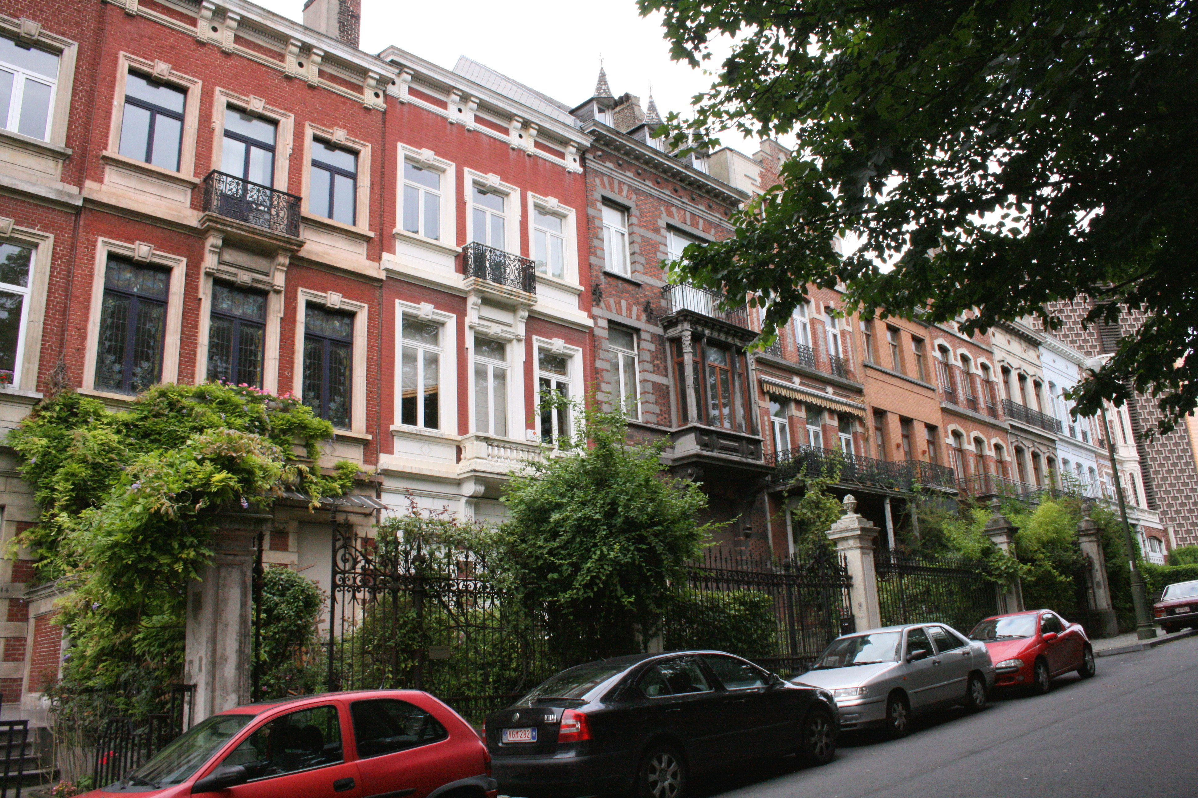 Rue Vautier, Ixelles (Bruxelles), Belgique. A droite de l'image immeuble du Musée des Sciences naturelles de Belgique